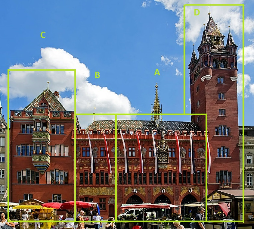 De opbouw van het raadhuis doorheen de jaren (A)1504-1514 (B)1606-1608 (C) 1899-1901 (D)1899-1901